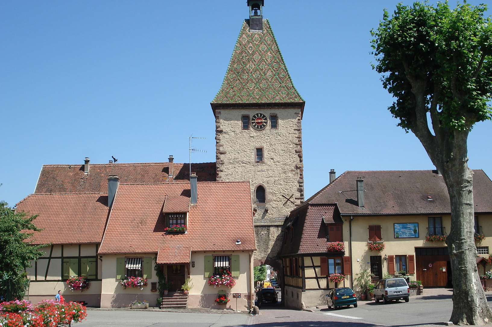 Bergheim, Alsace (Haut-Rhin, France). Porte Haute (allem. Obertor), XIVe siècle.